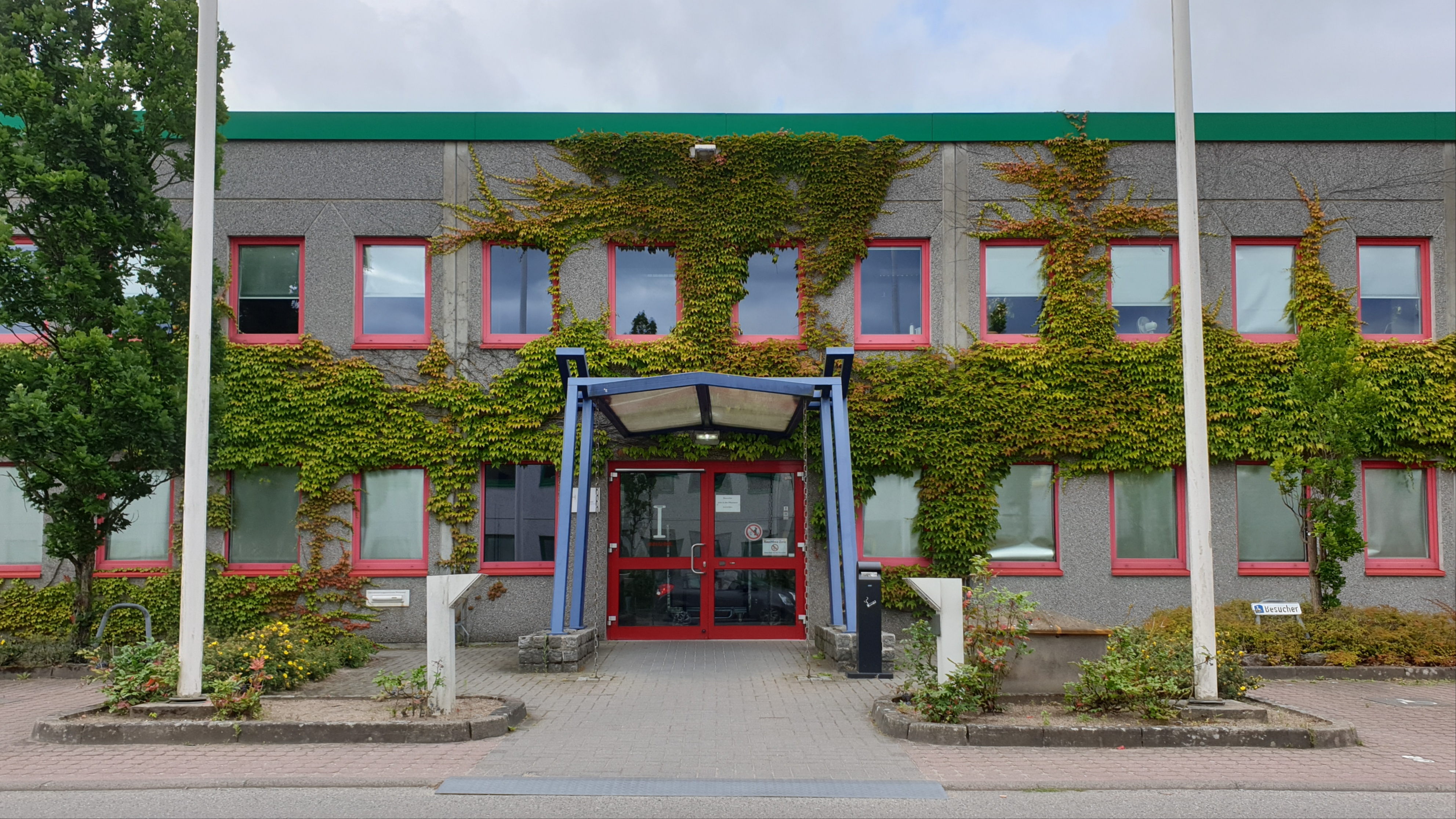 Dienstleistungszentrum Personal, ehemals Finanzverwaltungsamt Schleswig-Holstein, Haus I